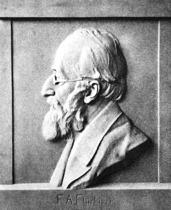 Bildnisrelief für Friedrich August Flückiger (1828–1894) ein Bildnis Relief für das Pharmazeutische Institut in Strassburg. Geschaffen 1906, von Ida Schaer-Krause (1877–1957) Bildhauerin